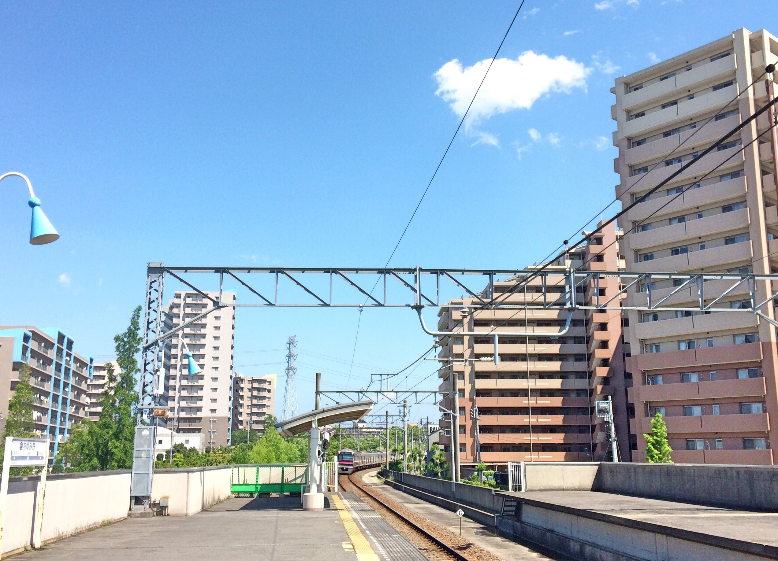 おゆみ野駅ホームから